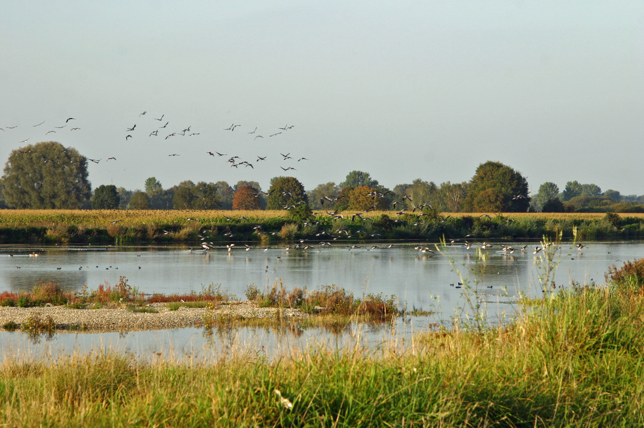 Vogelzug im herbstlichen Sophienried